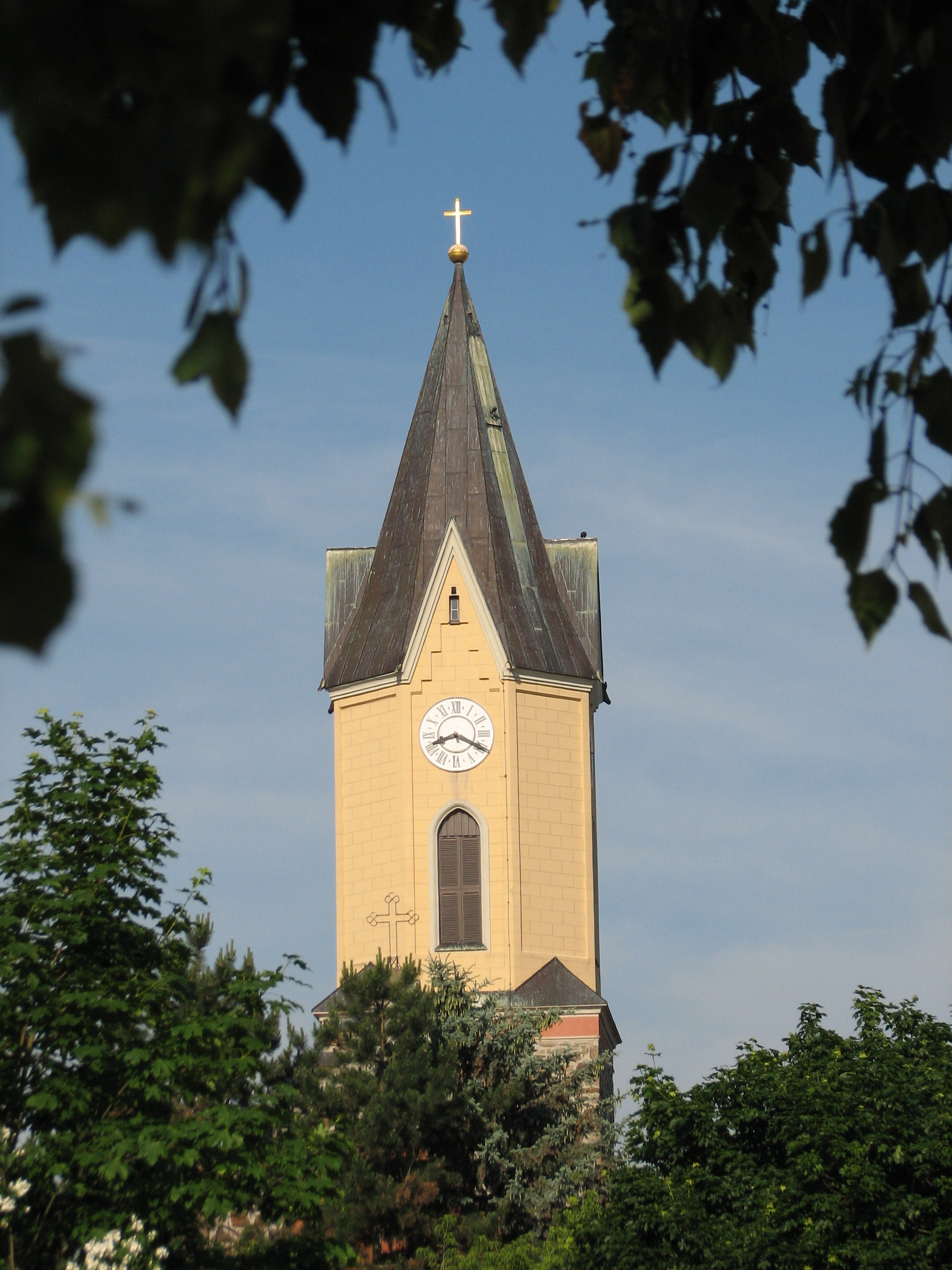 Naturgerahmt: Der Kirchturm zu SommerfeldFoto: Holger Zürch